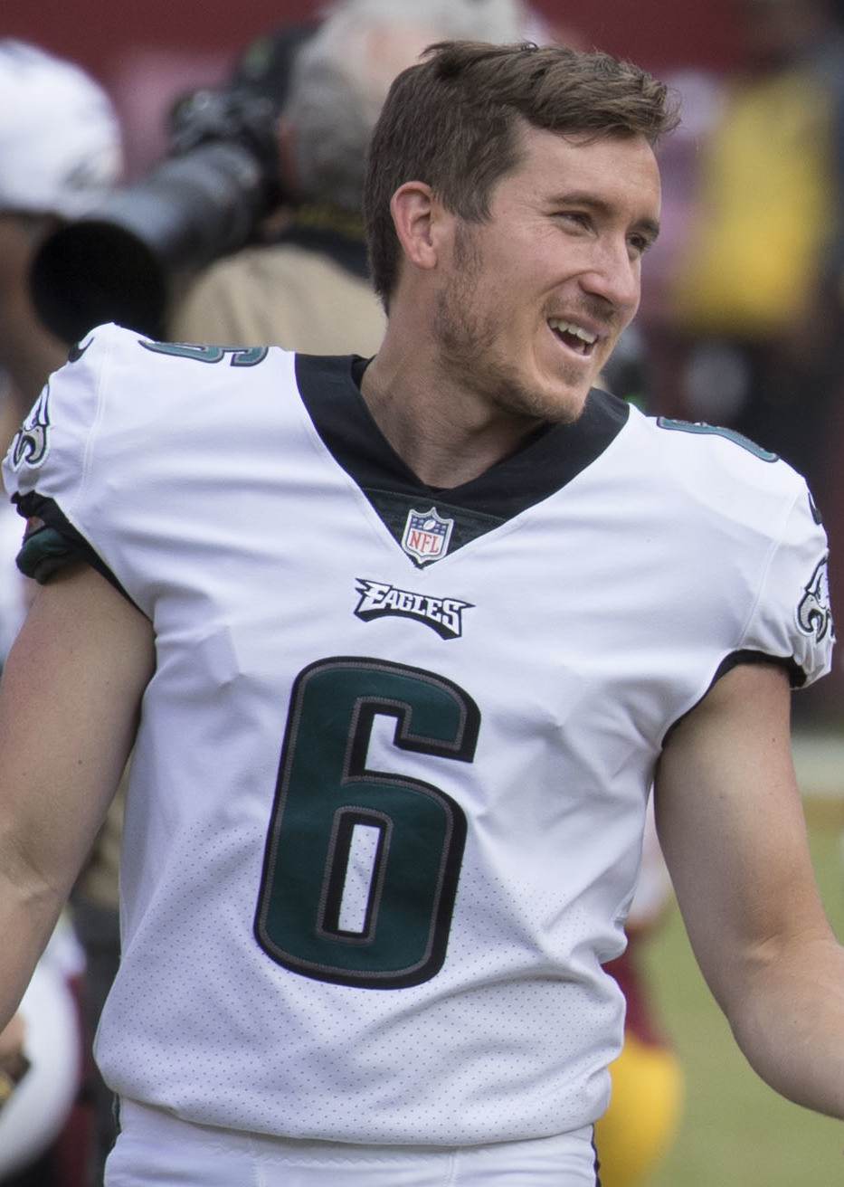 Eagles at Redskins 9/10/17